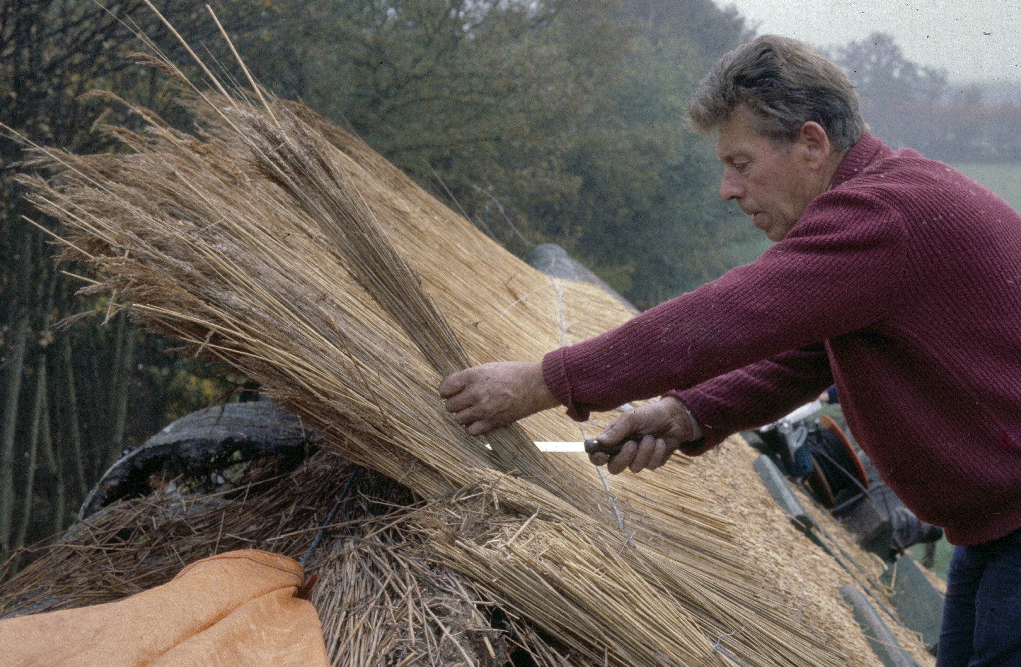 Riet/ Rietdekken: Rietdekker aan het werk (opmerking: Dia verdwenen uit de collectie)